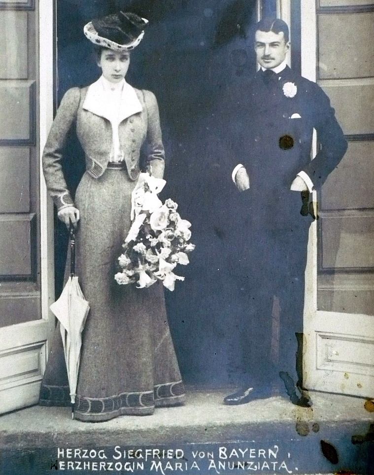 Herzog Siegfried in Bayern und seine Verlobte Maria Annunziata von Österreich, 1902